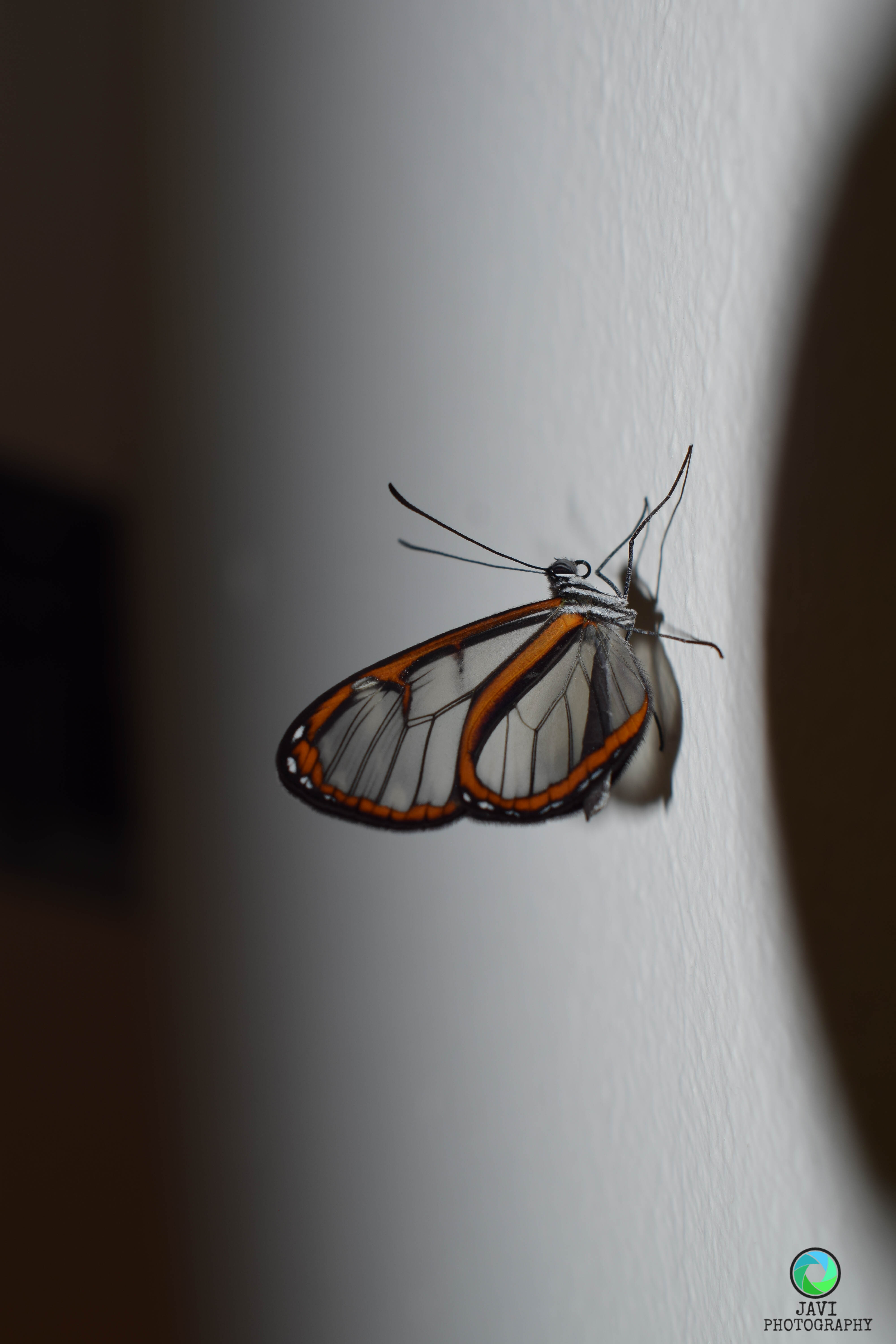 Greta oto. Vista en la ciudad de manizales - Caldas (Colombia) . fotografía: Hector Javier Rivera Torres.